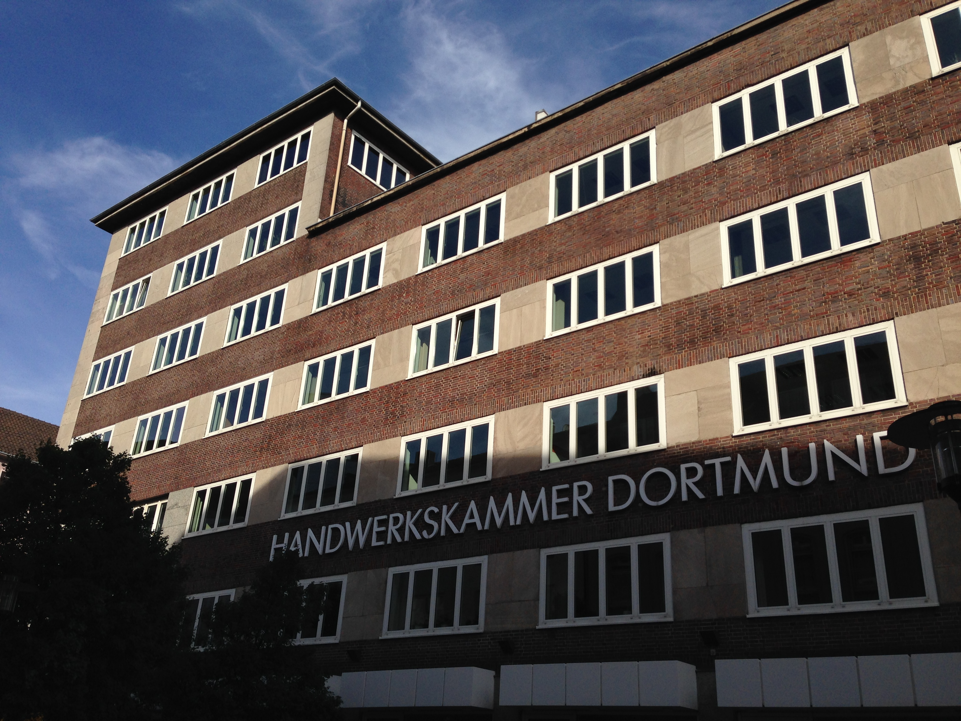 Handwerkskammer Dortmund, Reinoldistraße 7/9 This is a photograph of an architectural monument. 0309